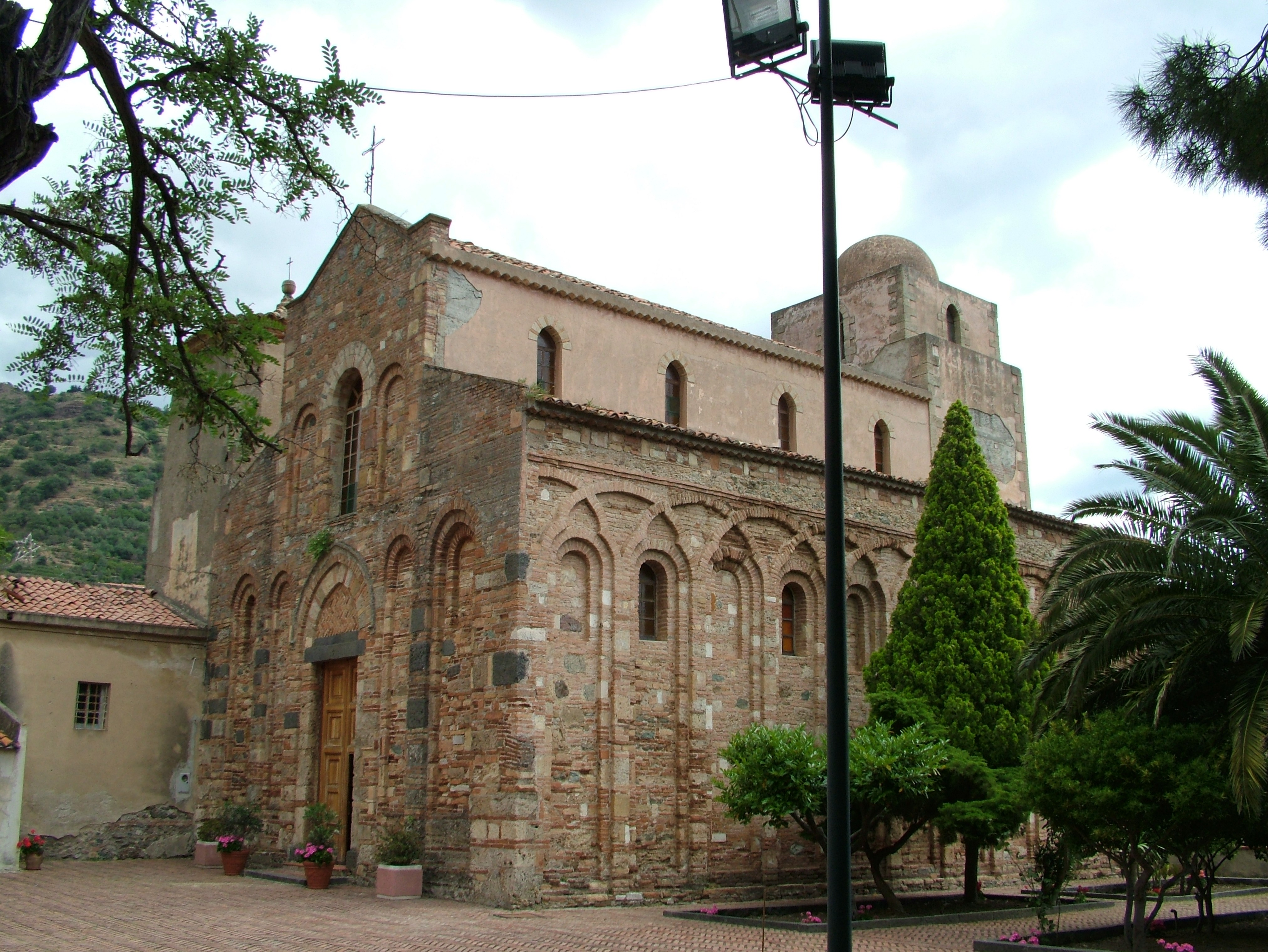 Itala, Provinz Messina, Sizilien, die Kirche SS Pietro e Paolo